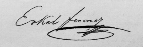 Erkel Ferenc aláírása